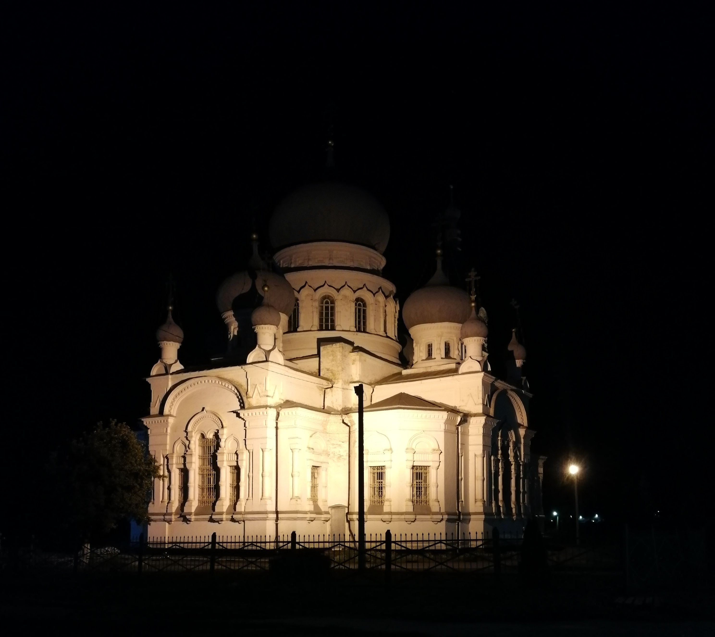 Церковь Рождества Христова (Анна)